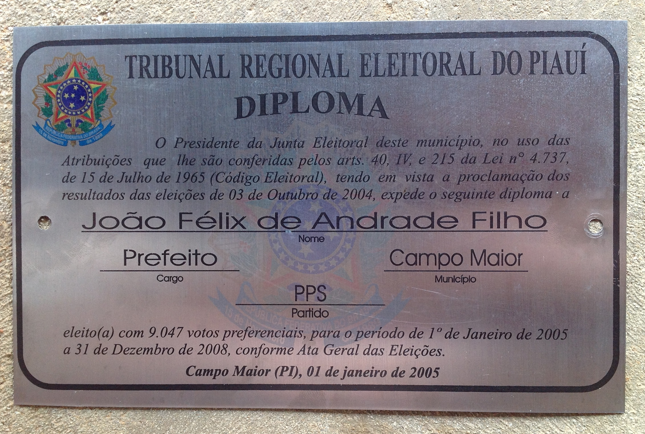 Diploma cerimonial de prefeito no Brasil de acordo com o Código Eleitoral Brasileiro - Lei nº 4.737 de 15 de julho de 1965.